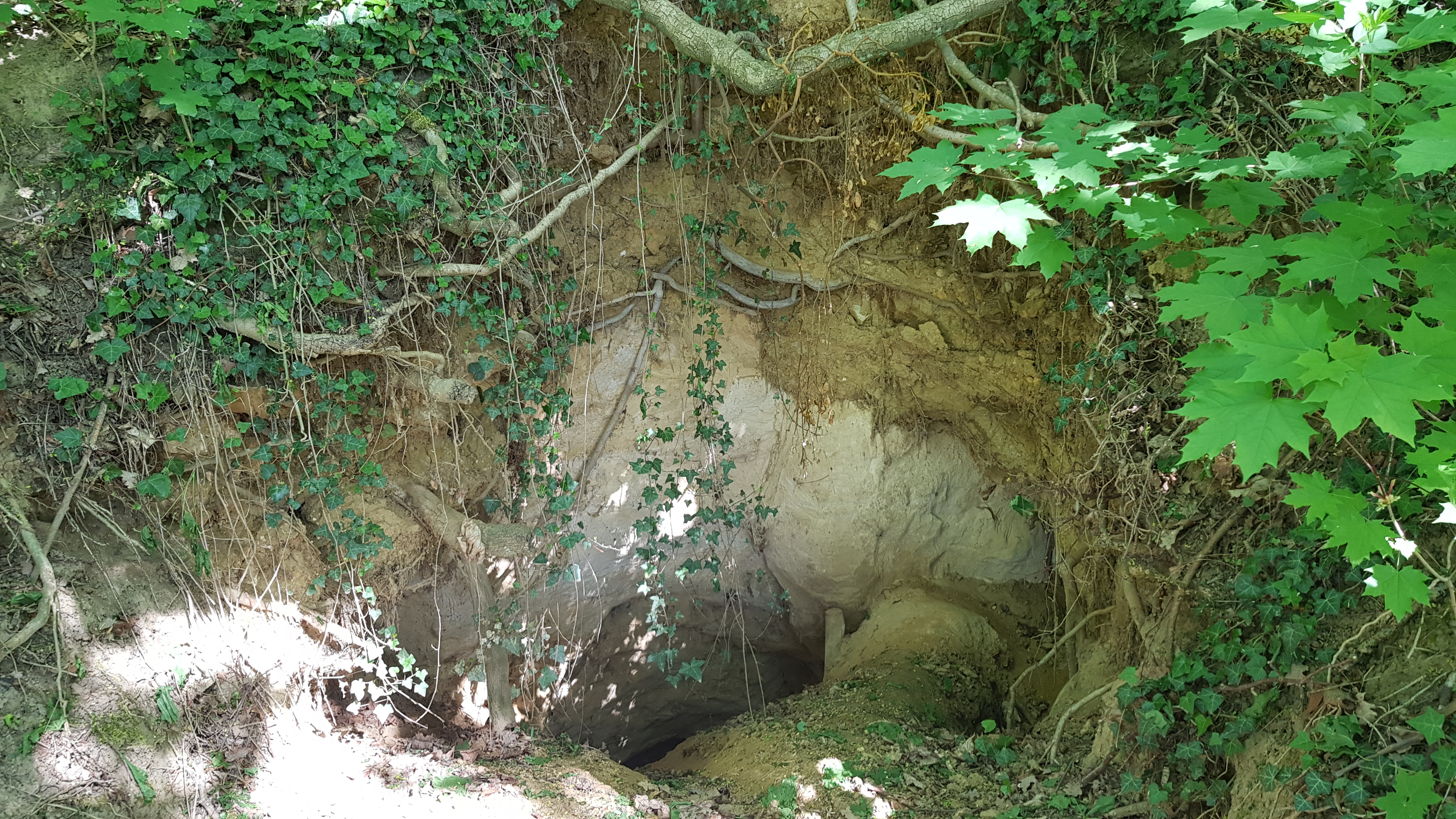 Auvermennekesloak, Craubeek, Nederland